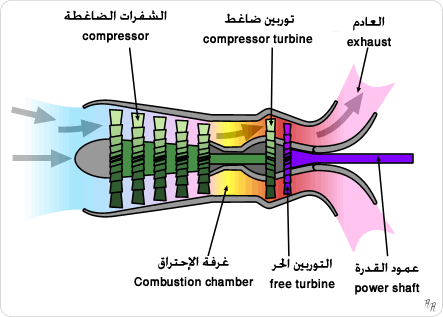 Turboshaft محرك العمود التوربيني